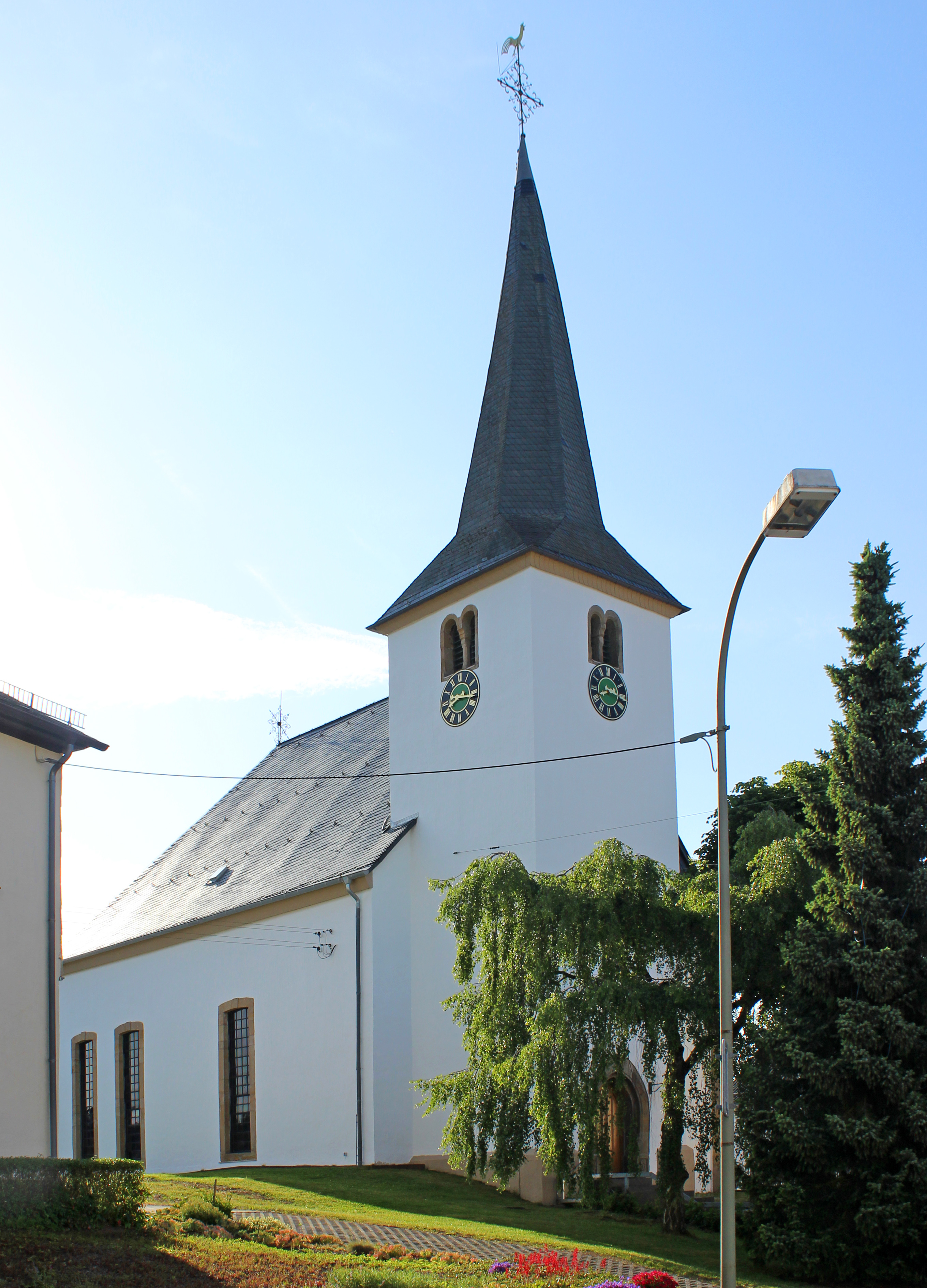 Evangelische Kirche in Sötern, Gemeinde Nohfelden, Landkreis St. Wendel, Saarland